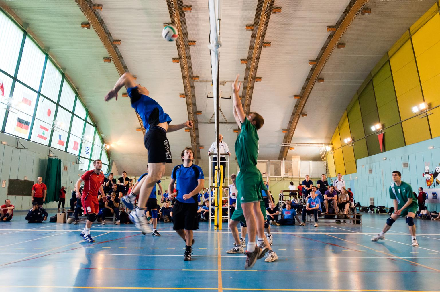 École polytechnique, match de volley, grand gymnase.